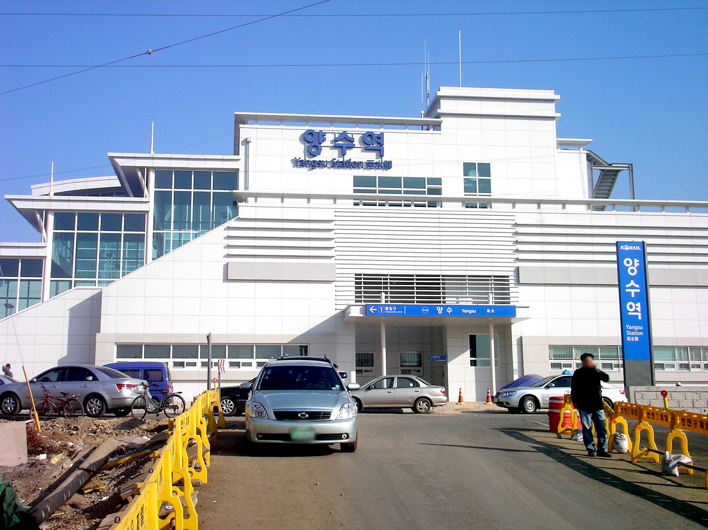 Yangsu Station (ko ja)